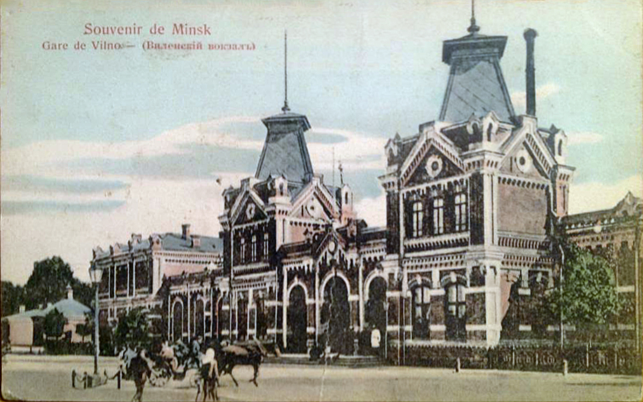 Беларуская (тарашкевіца): Менск (Miensk), пляц Прывакзальны (plac Pryvakzalny). Вакзал Віленскі (Vilenski)